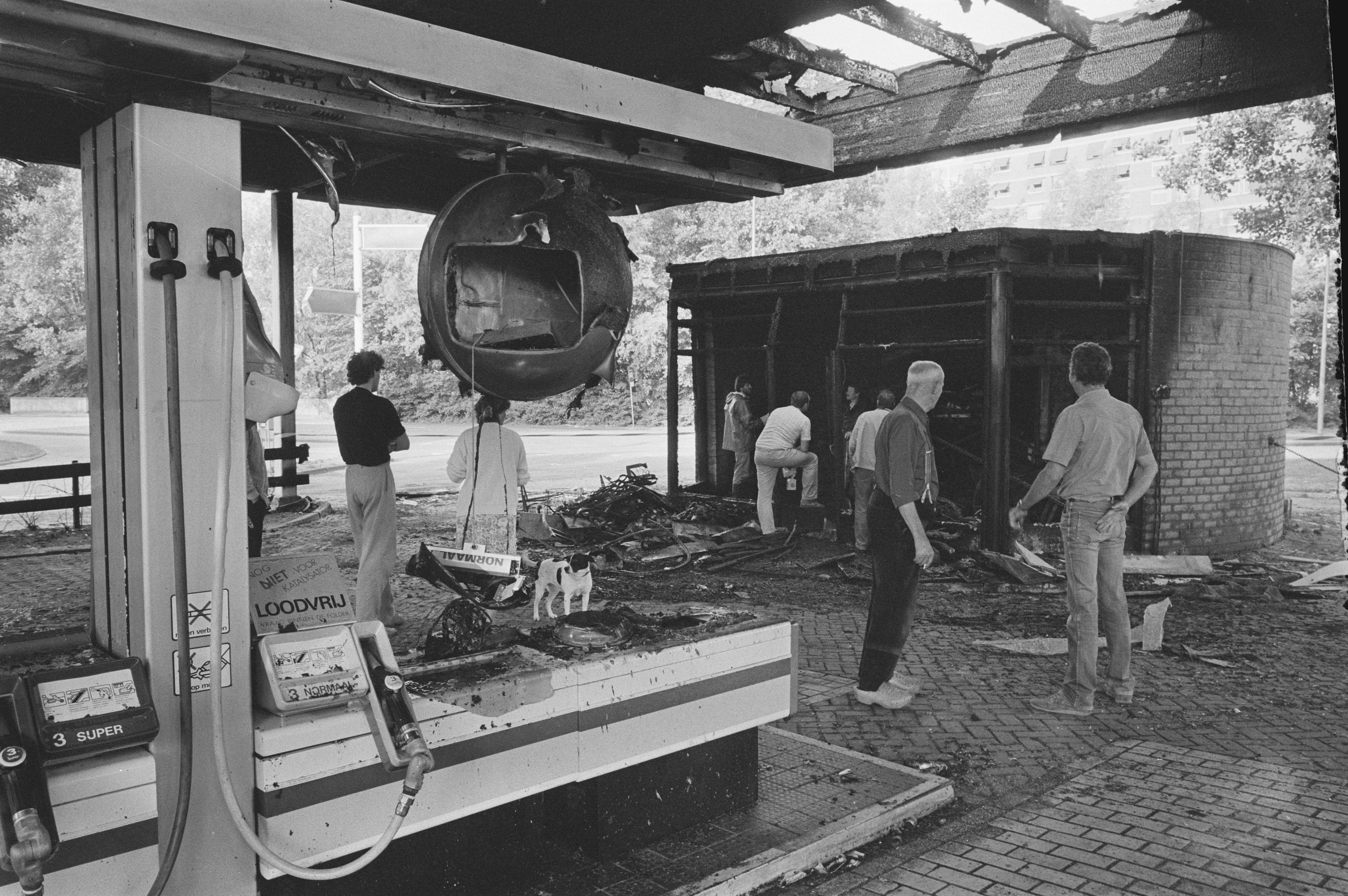 Collectie / Archief : Fotocollectie Anefo Reportage / Serie : [ onbekend ] Beschrijving : Shell-station in Amsterdam geheel uitgebrand na aanslag Datum : 16 juni 1986 Locatie : Amsterdam, Noord-Holland Trefwoorden : pompstations Instellingsnaam : Shell Fotograaf : Croes, Rob C. / Anefo Auteursrechthebbende : Nationaal Archief Materiaalsoort : Negatief (zwart/wit) Nummer archiefinventaris : bekijk toegang 2.24.01.05 Bestanddeelnummer : 933-6871